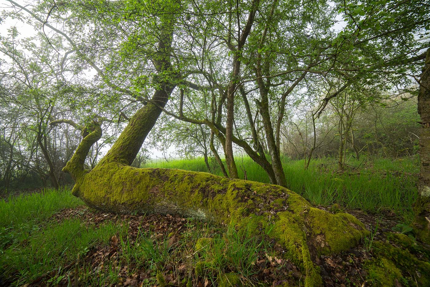 „Naturschutzgebiet Grohberg“, die liegende Eiche